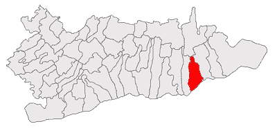 Categorie:Hărţi ale judeţului Călăraşi